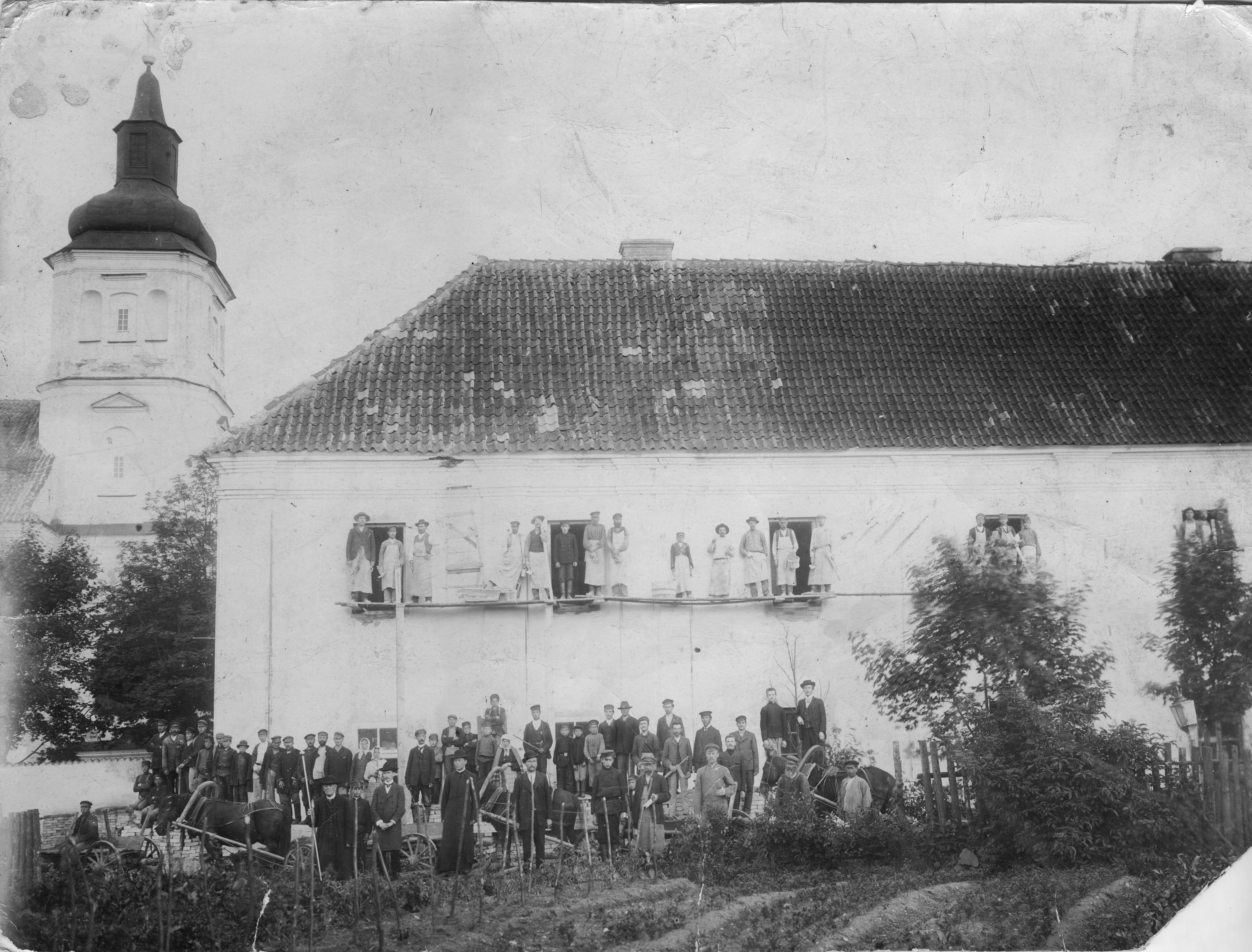 Беларуская (тарашкевіца): Слонім (Słonim). Касьцёл Беззаганнага Зачацьця Найсьвяцейшай Панны Марыі і кляштар бэрнардынак